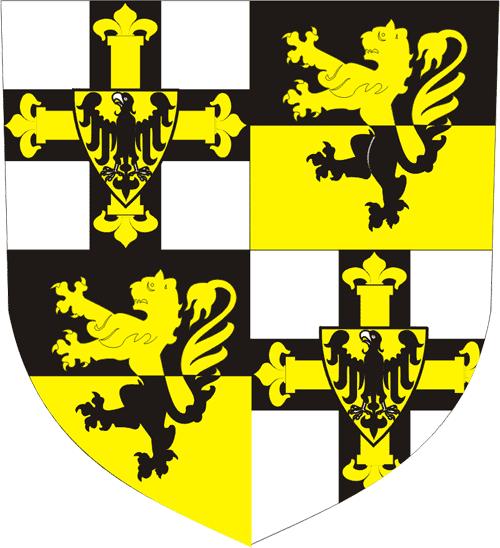 Teutonic Order - Coat of Arms of the Grandmaster Wappen des Hoch-und Deutschmeisters des Deutschen Ordens Heinrich Reffle von Richtenberg